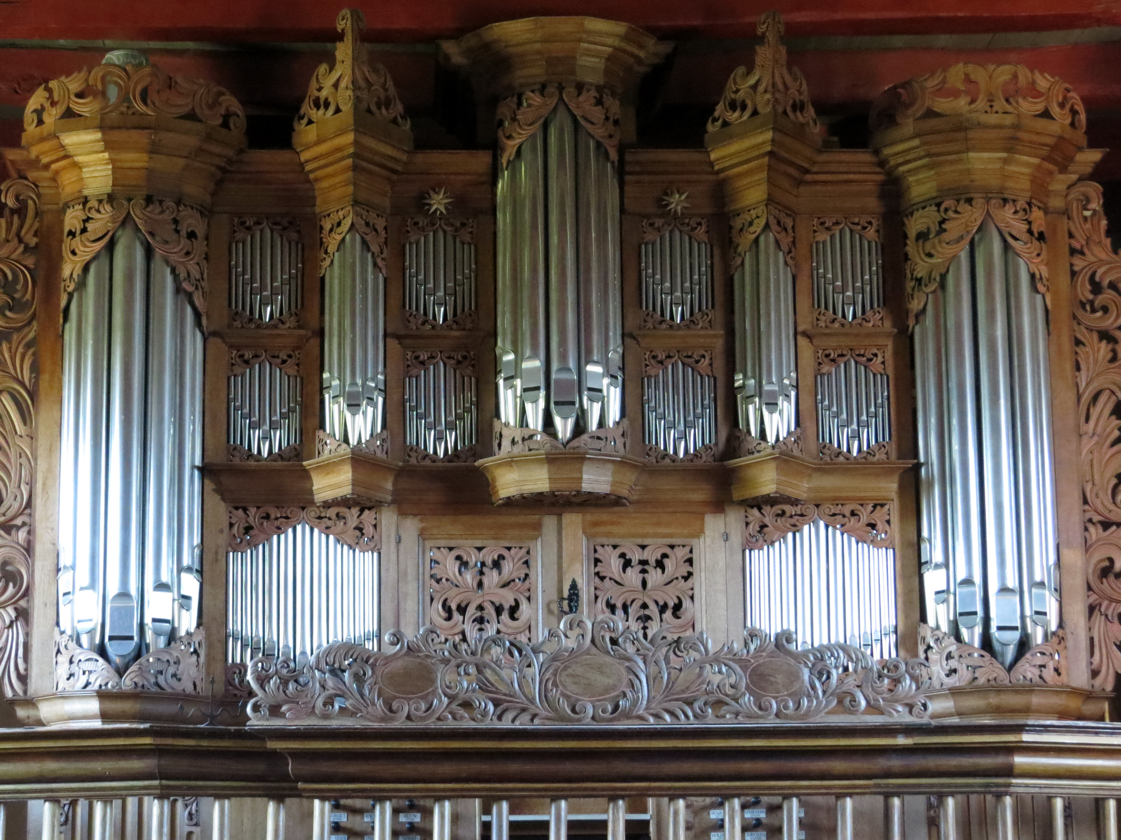 Orgel in der Alten Kirche Pellworm, Schleswig-Holstein